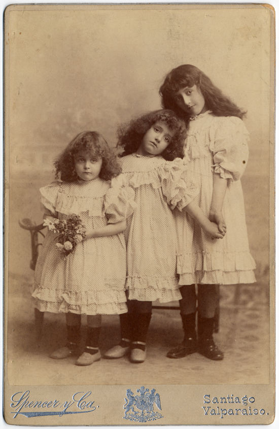 Victoria, Oriana y Luz Huneeus Gana